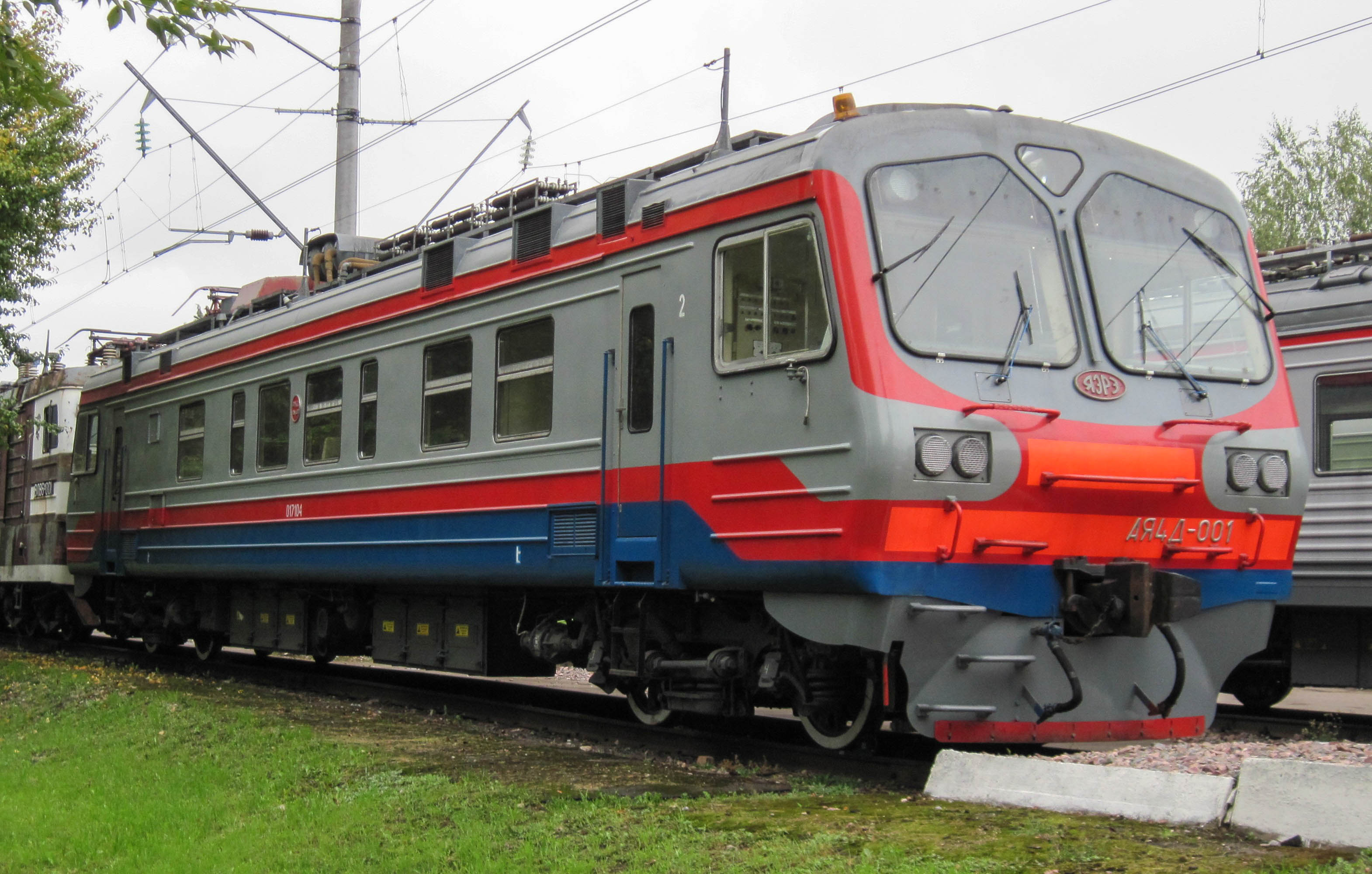 Автомотриса АЯ4Д-001 на выставке Экспо-1520 в 2011 году